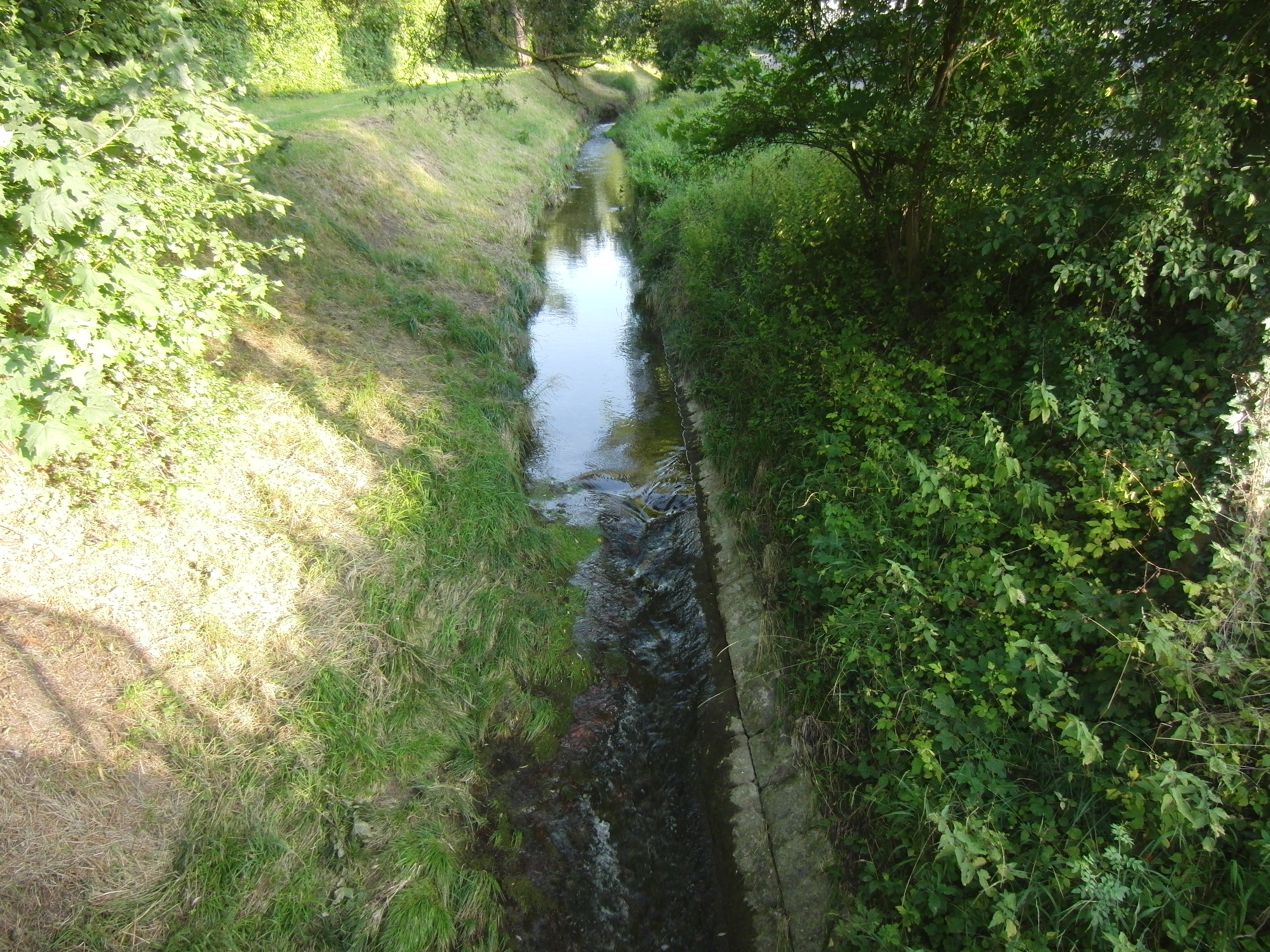 Der Mattenbach kurz vor der Mündung.